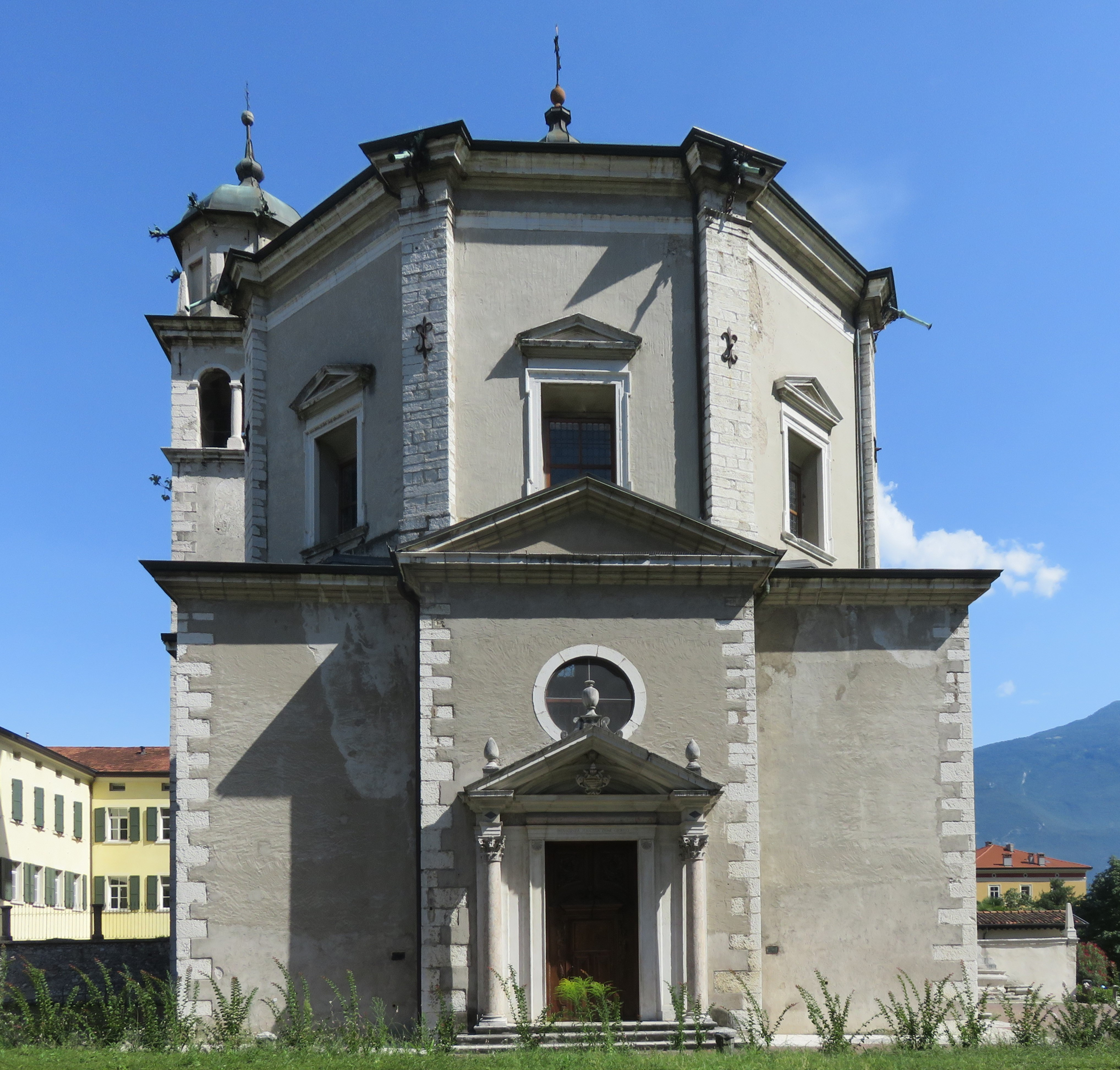 La Chiesa dell’Inviolata, in stile barocco, è il più importante monumento di Riva del Garda. Edificata nel 1603, consacrata nel 1636 grazie a Gaudenzio Madruzzo e Alfonsina Gonzaga.